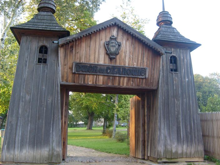 Brama koło Muzeum Wnętrz Dworskich w Ożarowie. Kiedyś stała przed wejściem, obecnie znajduje się po lewej stronie dworku.